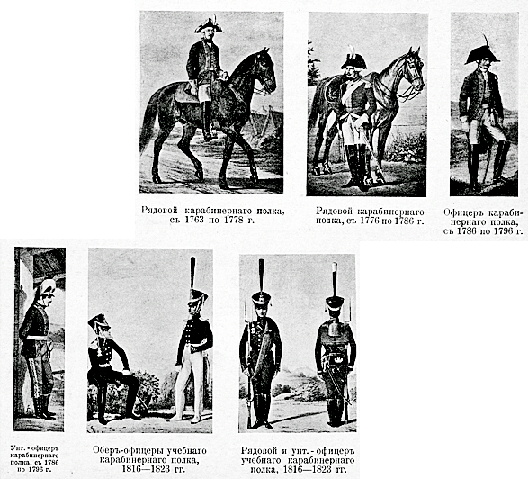 Это изображение было использовано для иллюстрирования статьи «Карабинеры» опубликованной в двенадцатом томе «Военной энциклопедии», который был издан книгоиздательским товариществом И. Д. Сытина в 1913 году в столице Российской империи городе Санкт-Петербурге.